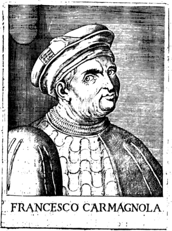 Ritratto del condottiero Francesco Bussone, detto Il Carmagnola